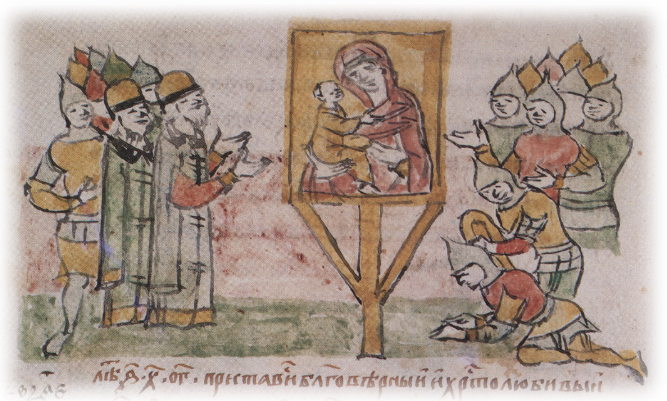 Благодарственное моление перед Владимирской иконой Богородицы, взятой Андреем Юрьевичем Боголюбским в поход на Волжскую Болгарию, после победы. Миниатюра из Радзивиловской летописи (БАН. 34. 5. 30. Л. 205 об.) Техника: перо, чернила Время создания: конец XV века Местонахождение: Оригинал летописи находится в Библиотеке Академии Наук в Санкт-Петербурге Источник: Радзивиловская летопись Изображенное время: 1164 год Изображенное событие: "Стояху же пешци со Святою Богородицею на полчищи под стяги... и поклонишася пред святою Богородицею, и почаша целовати Святую Богородицю с радостию великою и со слезами, хвалы и песни въздающе Ей". Литература, в которой описана миниатюра: Кондаков Н. П. О миниатюрах Кенигсберского списка начальной летописи // Радзивиловская, или Кенигсбергская, летопись. СПб., 1902. Т. 2. Статьи о тексте и миниатюрах летописи. С. 122; Арциховский А. В. Древнерусские миниатюры как исторический источник. М./1944. С. 19, 29, 35.